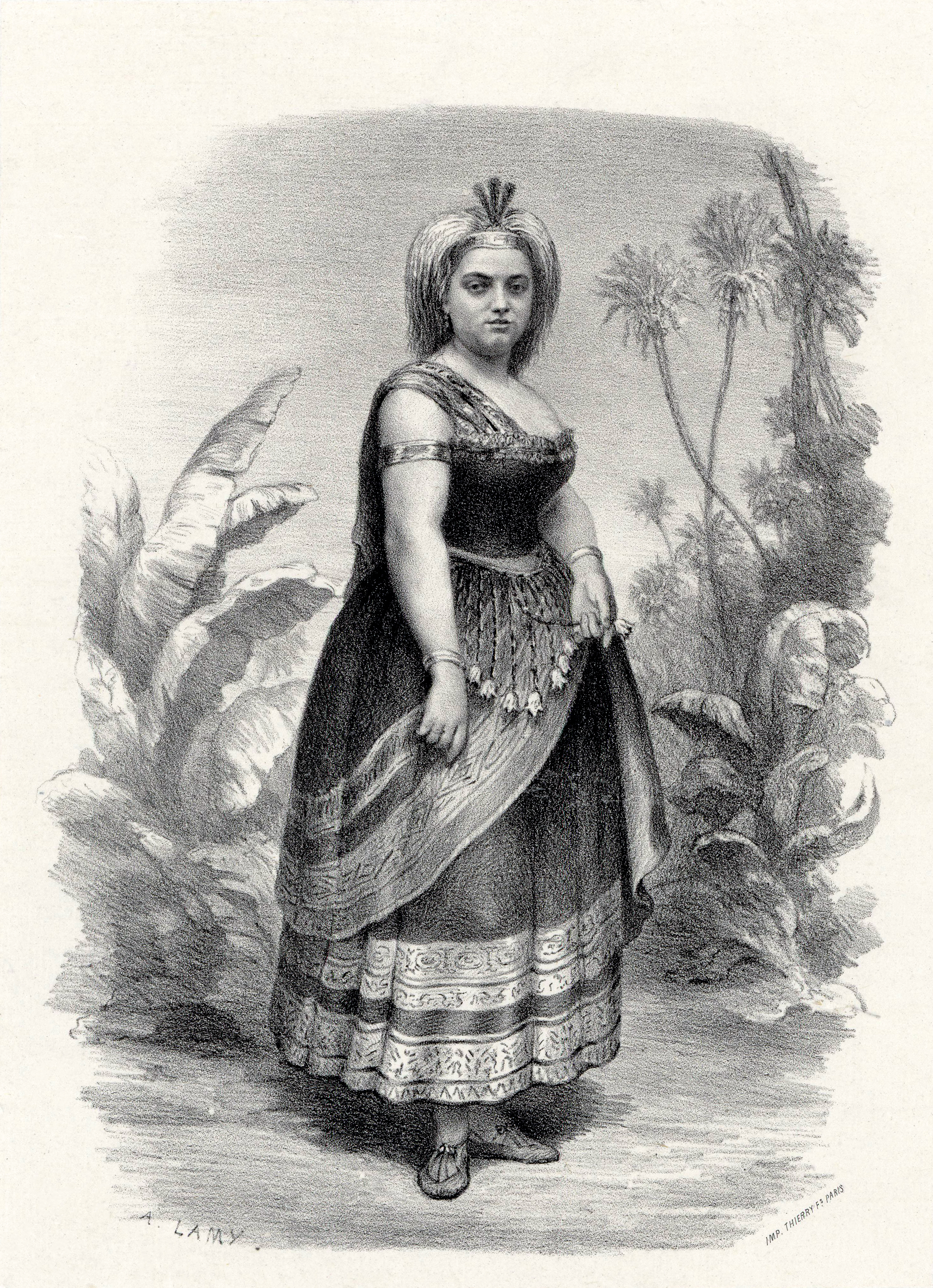 Marie Sass dans le rôle de Sélika dans L'Africaine de Meyerbeer